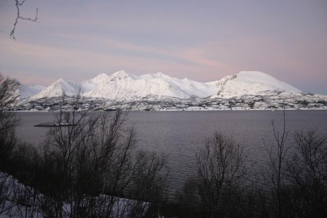 Grytøya i Troms (Foto: Trond Henningsen)